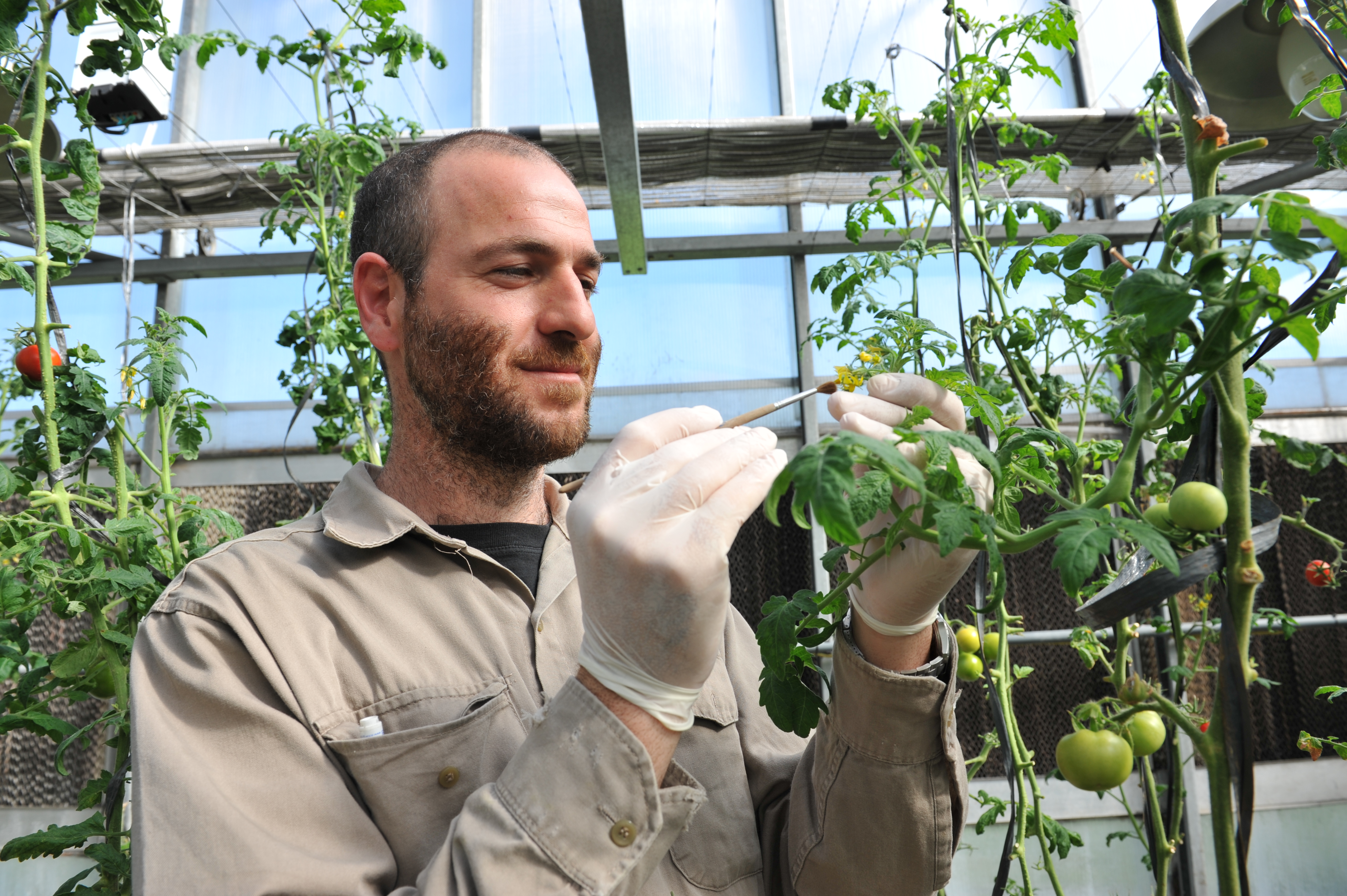 Tecnico del INTA en invernaculo. En enero del 2011 un consorcio internacional, en el que participa el INTA, logró secuenciar el genoma del tomate cultivado y silvestre. El hallazgo permitirá, implementar estrategias de mejoramiento genético para mejorar su sabor, nutrición y calidad.